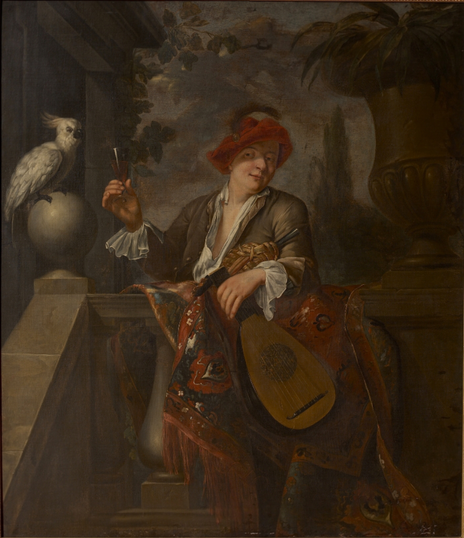 A musician